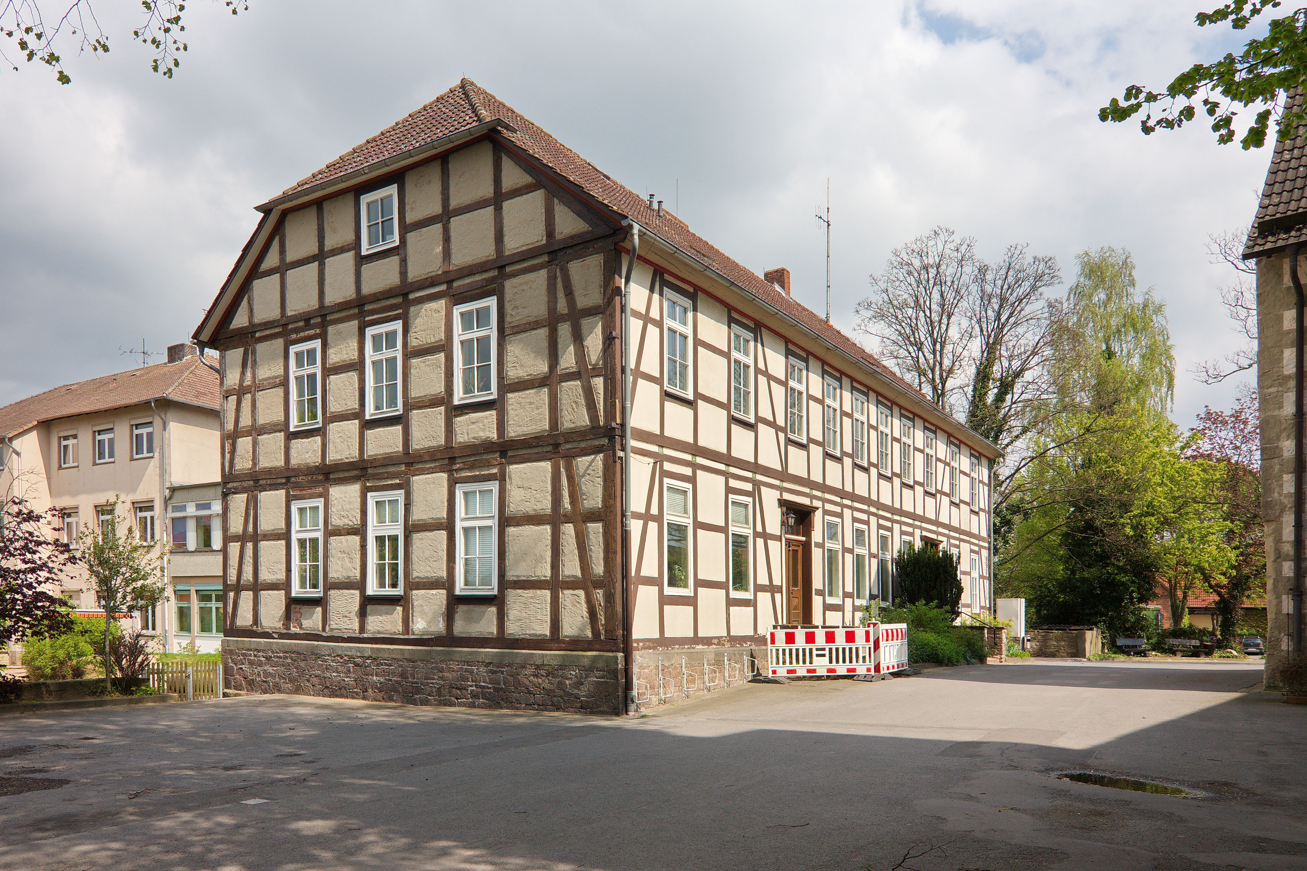 Denkmale in Aerzen, Niedersachsen, Deutschland.